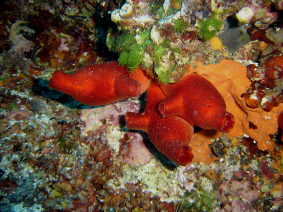 Ascidie rouge (Halocynthia papillosa) (Croatie) (Photo personnelle)